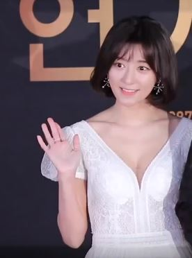 12월 31일 오후 서울시 영등포구 여의도 KBS 신관 웨딩홀에서 '2019 KBS 연기대상' 레드카펫 행사가 열려 '꽃길만 걸어요' 배우 최윤소, 설정환이 참석해 포토타임을 갖고 있다.